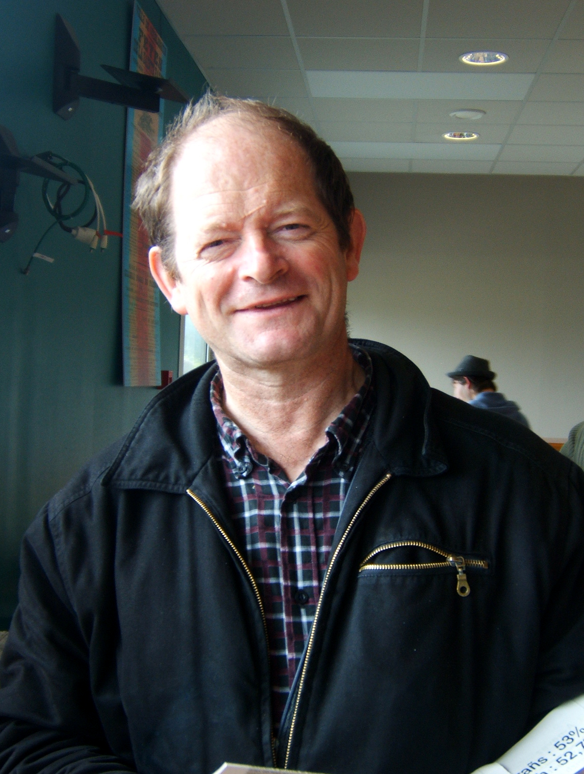 Yann-Fañch Jacq, fondateur de la maison d'édition Keit vimp bev, directeur de publication du journal Ya !.